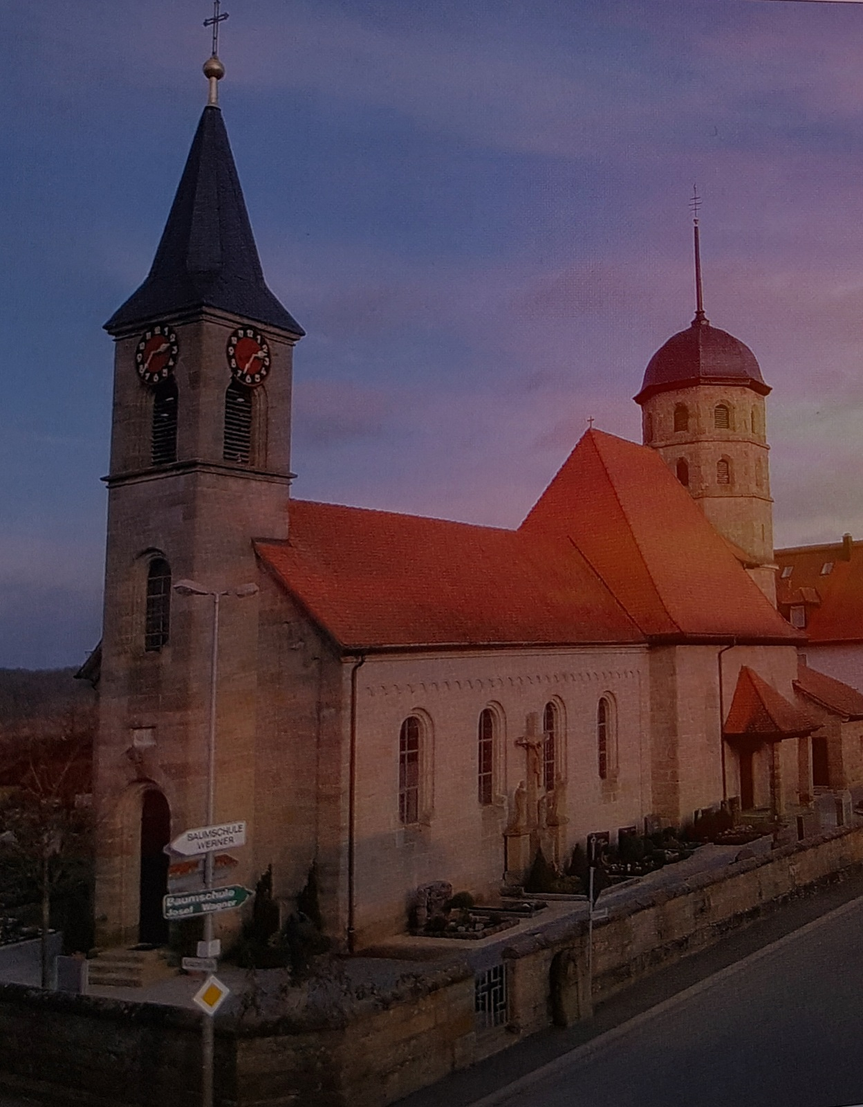 Doppelkirche mit Westfasade im Vordergrund (älterer Teil)